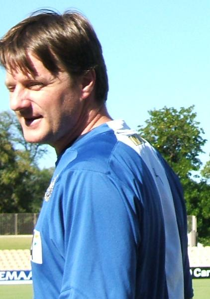 John Gloster at Adelaide Oval